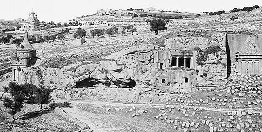 קבר זכריה, יד אבשלום וקבר בני חזיר מאוסף תצלומים שצולם בין השנים 1898-1946 בירושלים